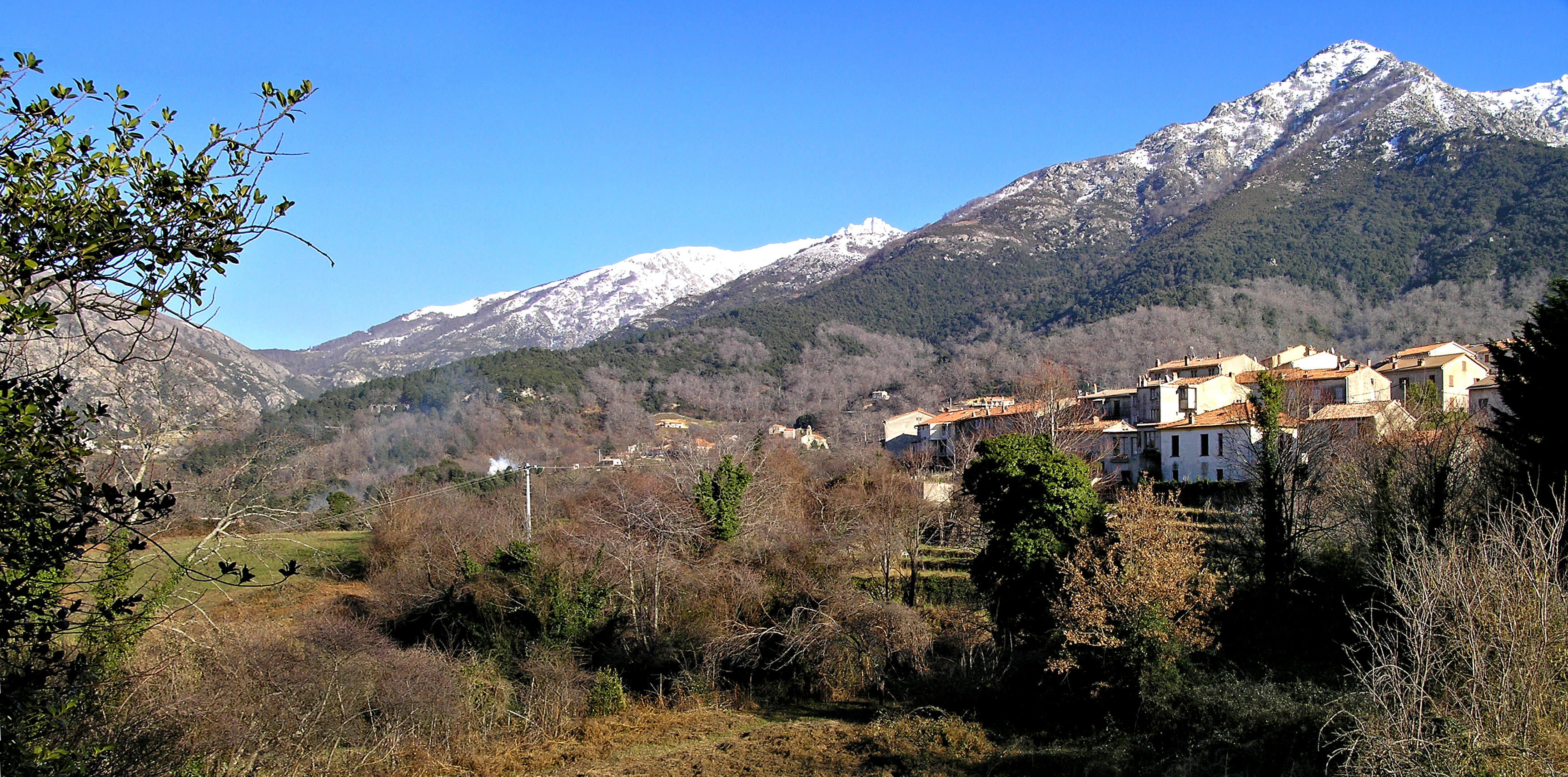 Bocognano (Corse) - Panorama du village. Au fond, le col de Vizzavona (1163 m)